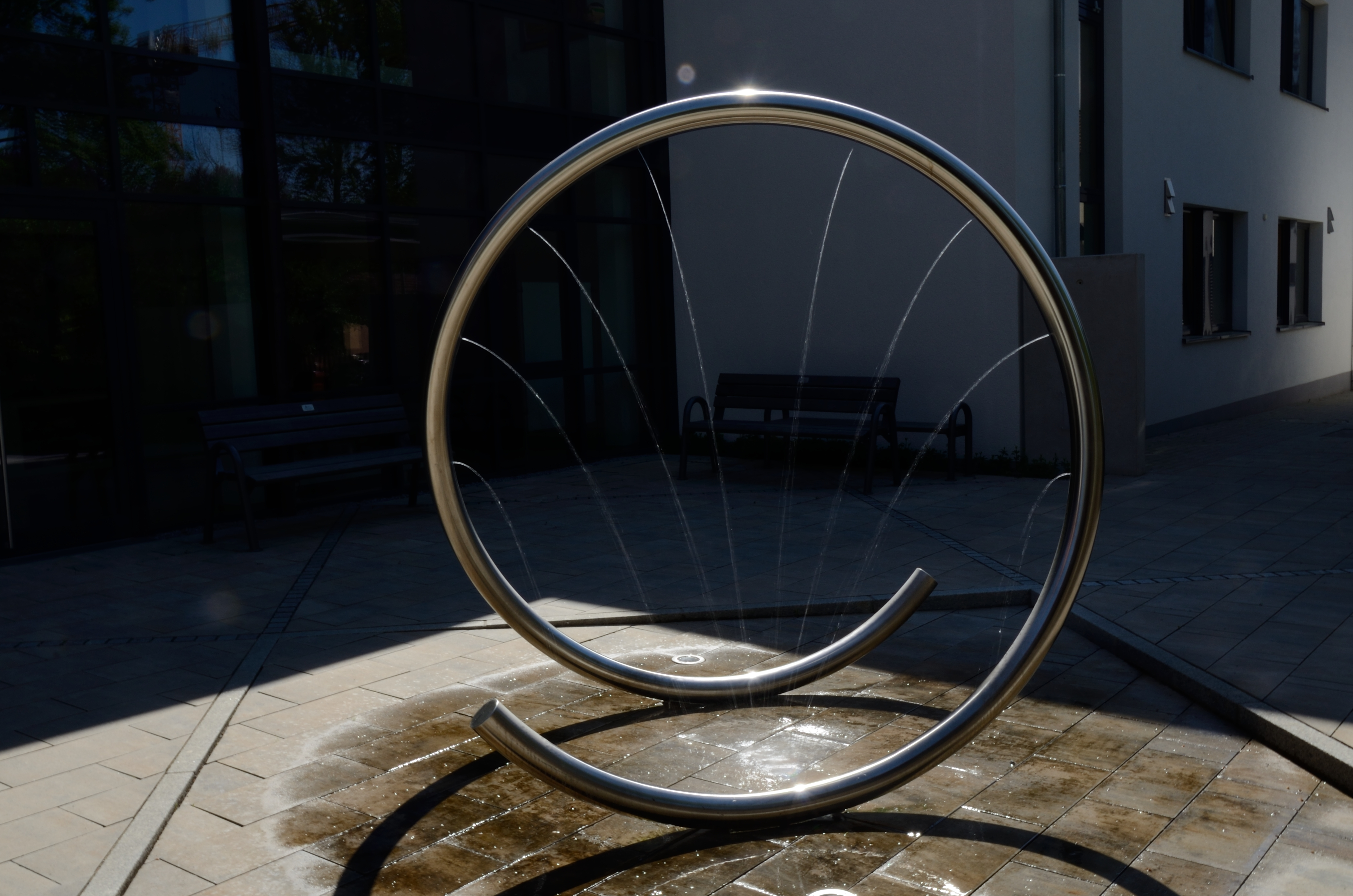 Brunnenanlage im Innenhof des Neuendettelsauer Rathauses